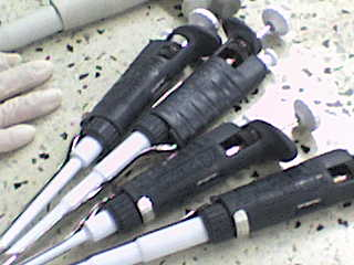 Un juego de micropipetas Gilson